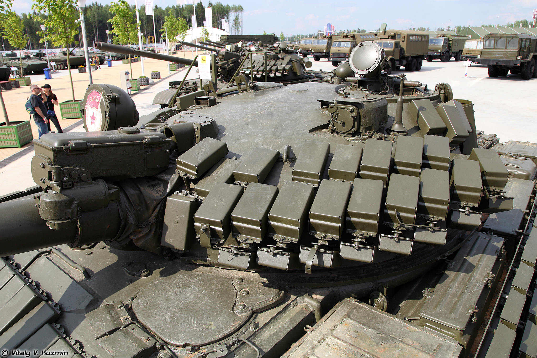 Т-62МВ (T-62MV)